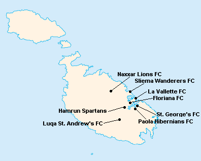 Répartition des clubs en First Division Maltaise 1948-1949.